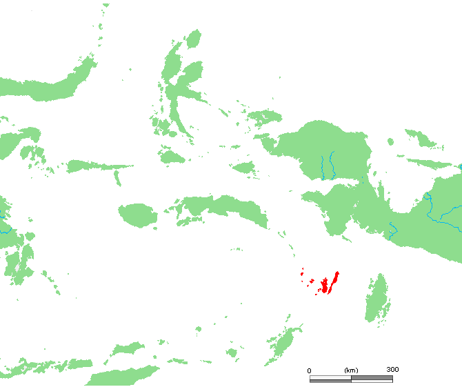 ID Kai islands.PNG